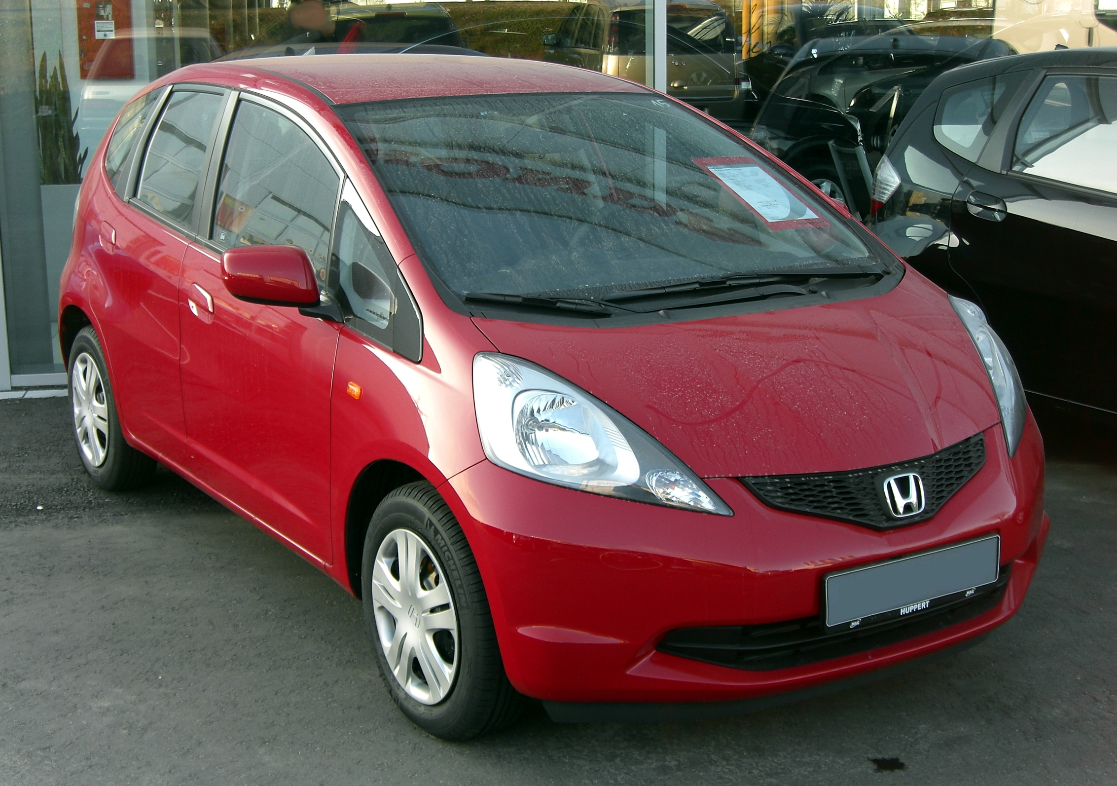 Honda Jazz III